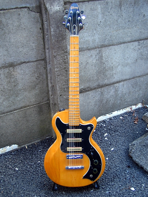 Gibson S-1